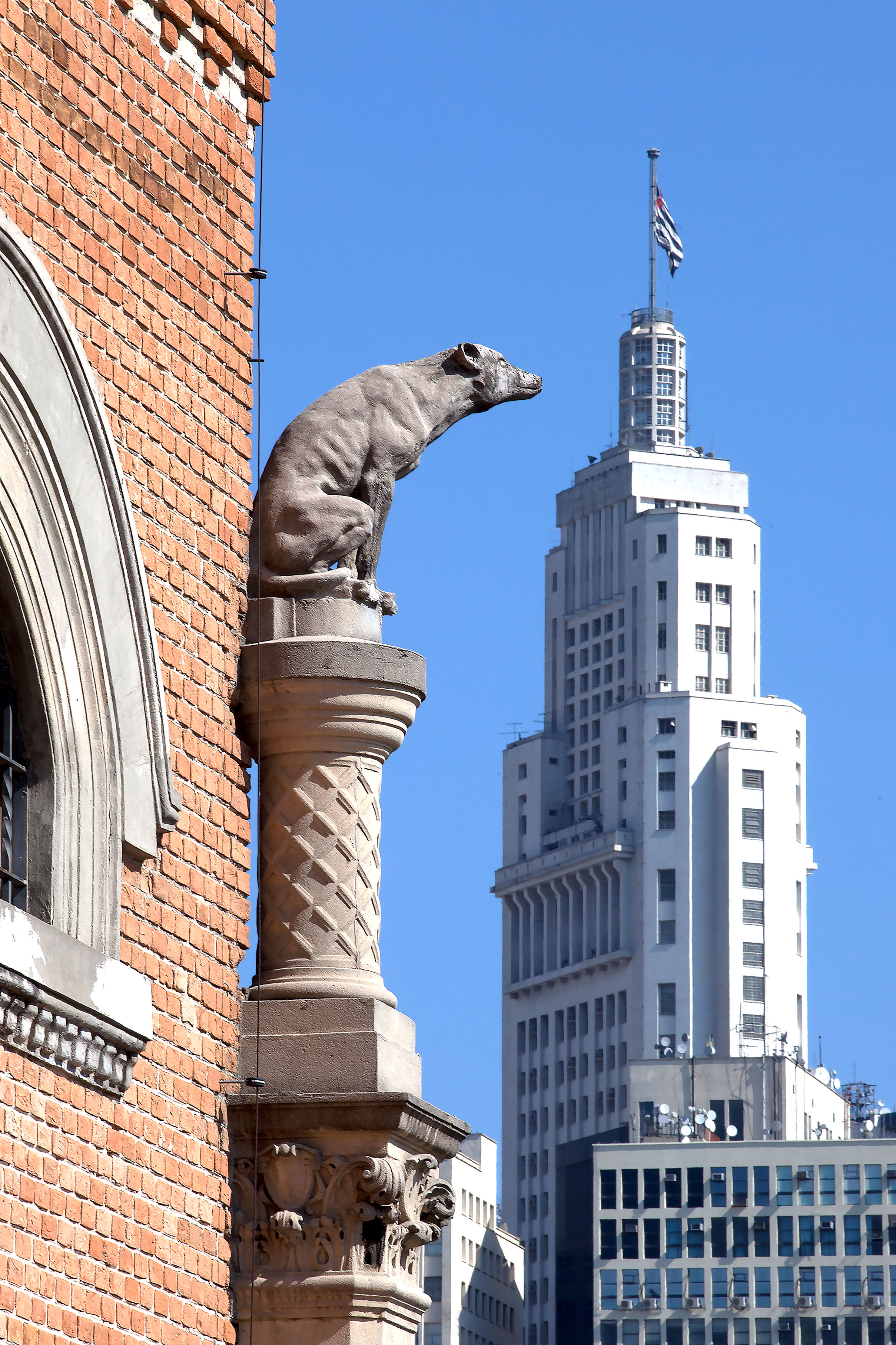 Edifício Altino Arantes ou Banespão antigo banco do Estado, símbolo de São Paulo, seu mirante é observado pelo cão, detalhe do Palácio das Indústrias tam bem patrimônio histórico.